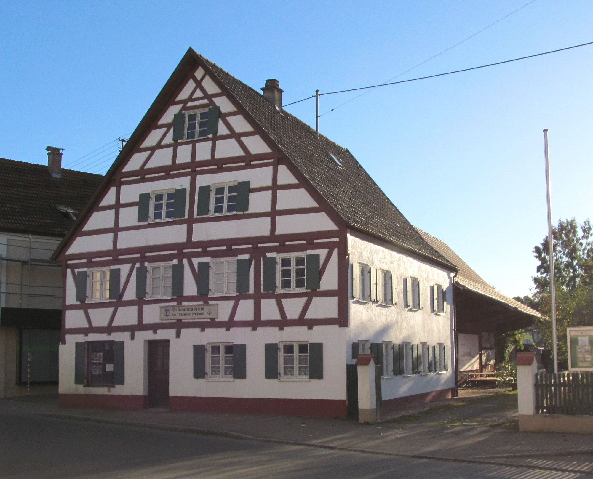 Das ehemalige Bauernhaus in der Edmund-Zimmermann-Straße 16 wurde im Jahre 1709 erbaut. Und hat Giebel mit vorkragendem verputztem Fachwerk. Es ist ein Denkmalgeschützten Fachwerkhaus. Heute vom Heimatverein genutzt.